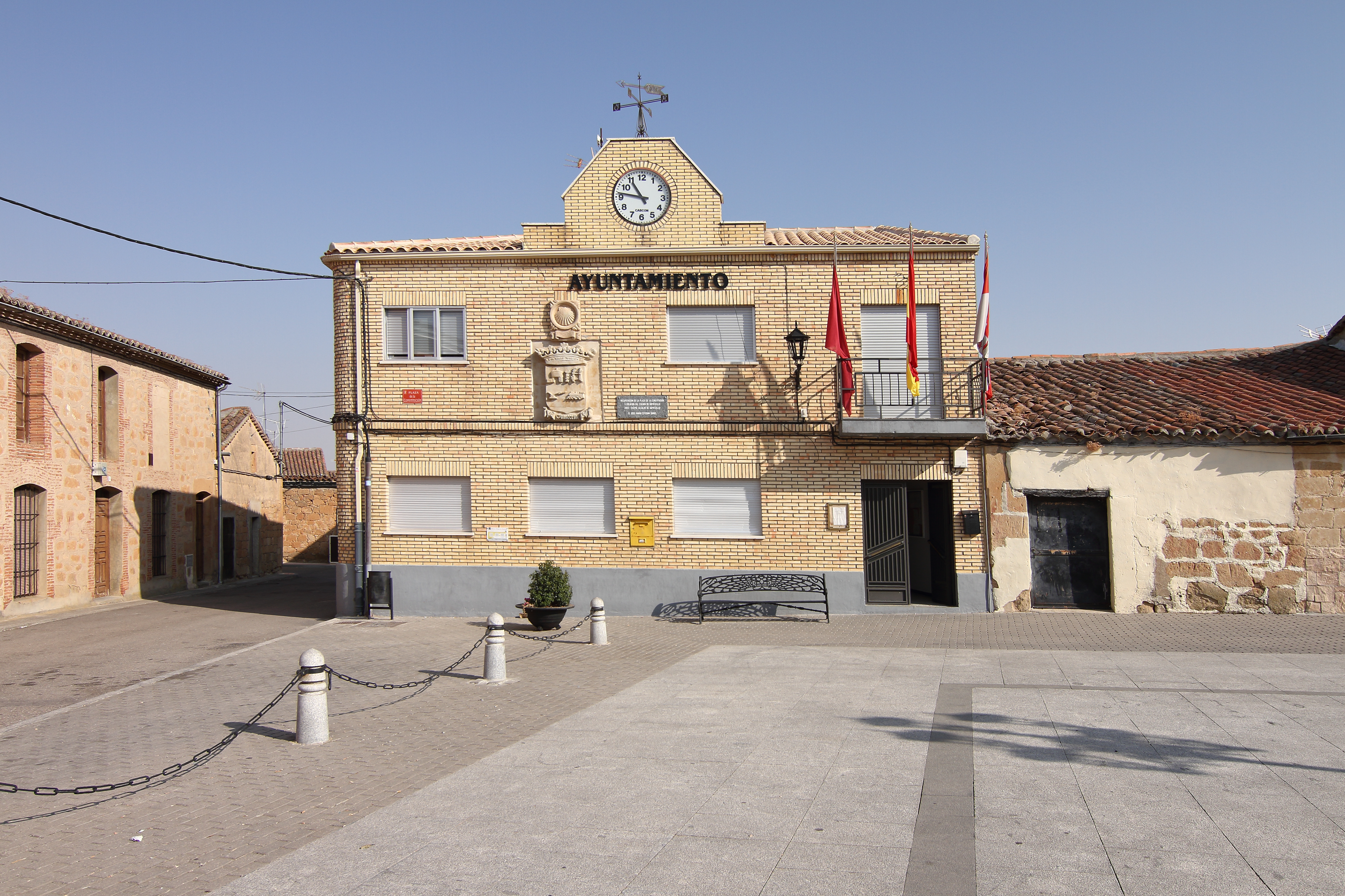 Ayuntamiento de Gomecello